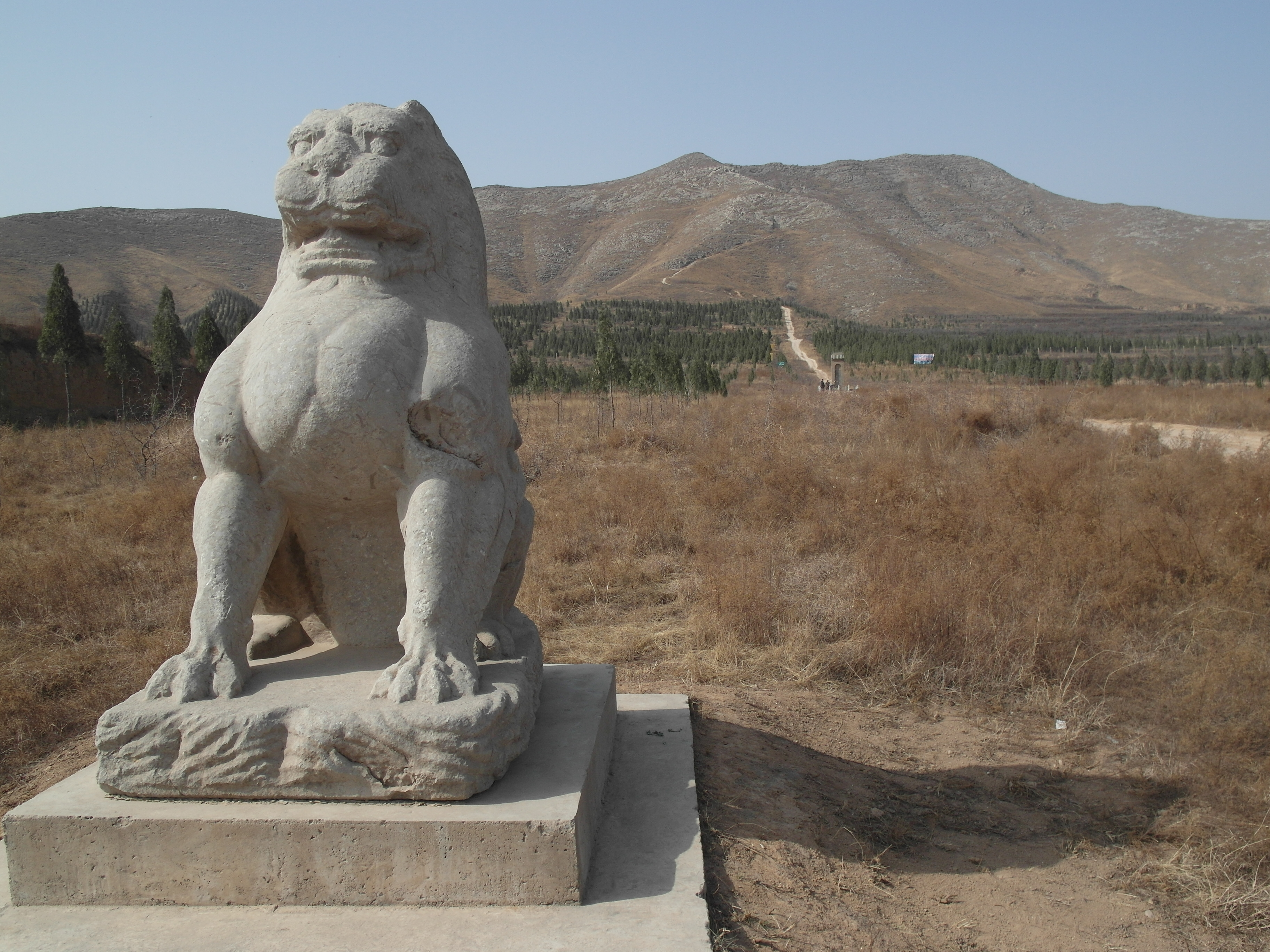 位于陕西省渭南市蒲城县东北